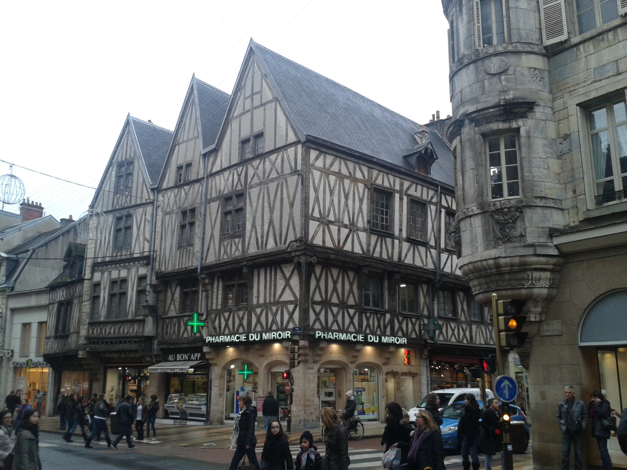 54 rue de la Liberté - Maison aux trois visages - Coin du Miroir - Dijon